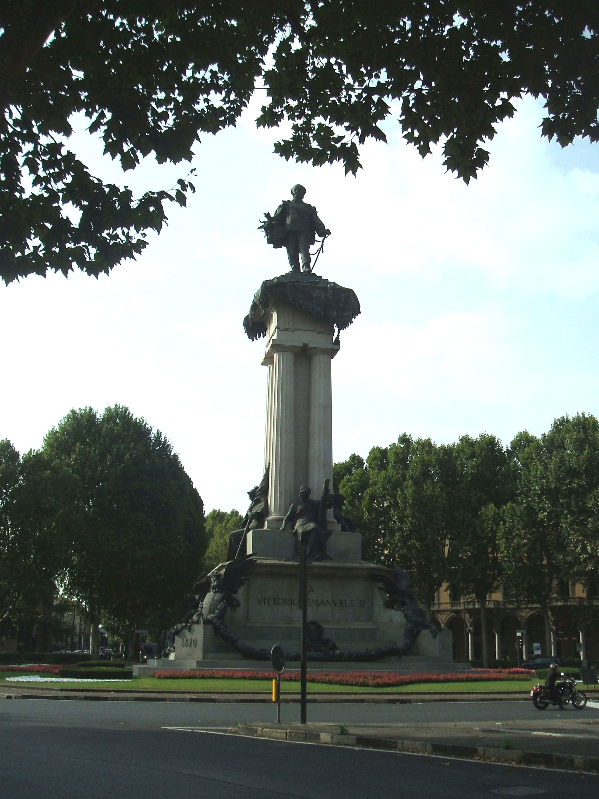 Monumento a Vittorio Emanuele II di Savoia, all'incrocio tra Corso Galileo Ferraris e Corso Vittorio Emanuele (Torino)